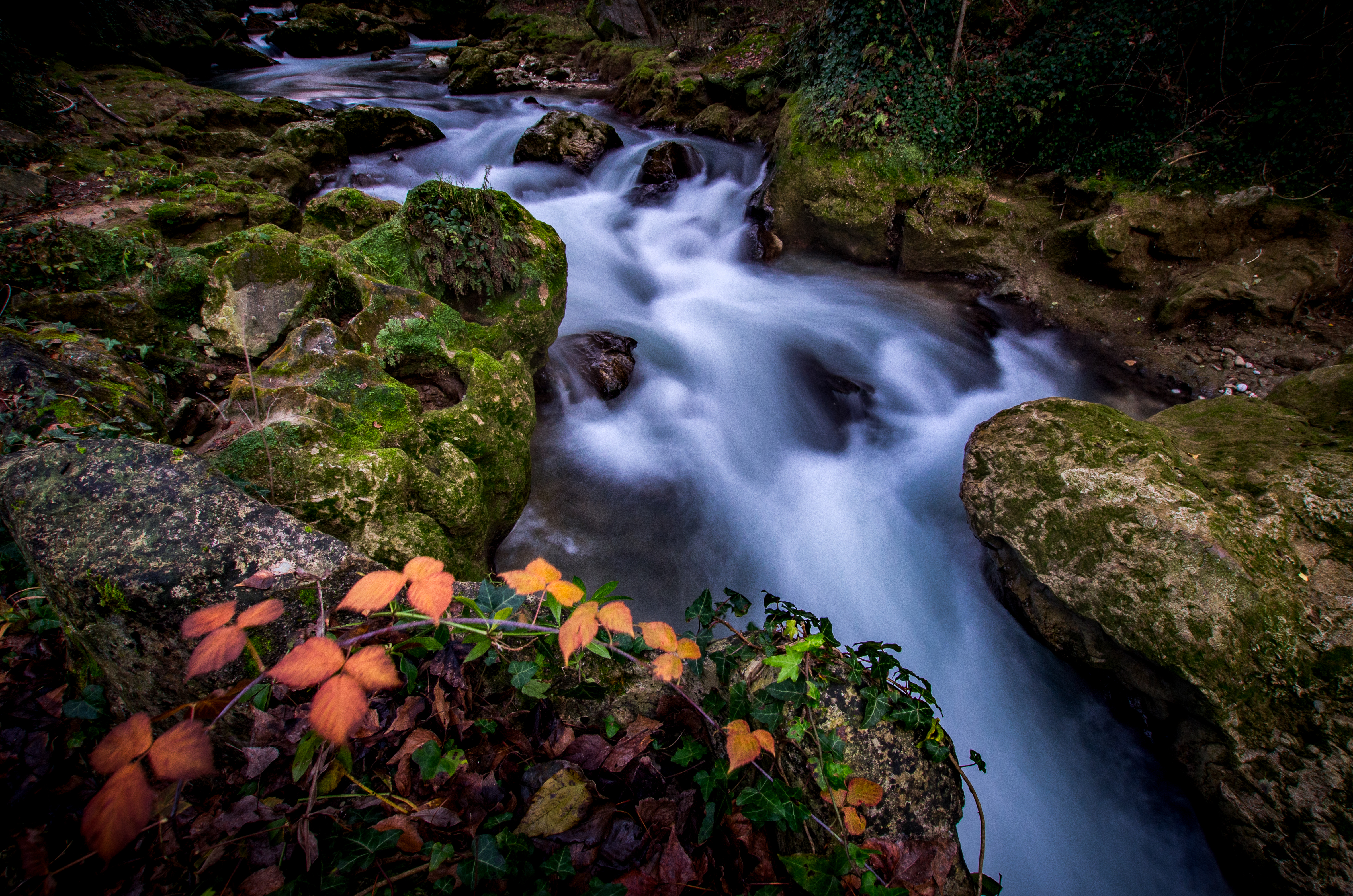 Tipico ruscello immerso nei boschi di Terni